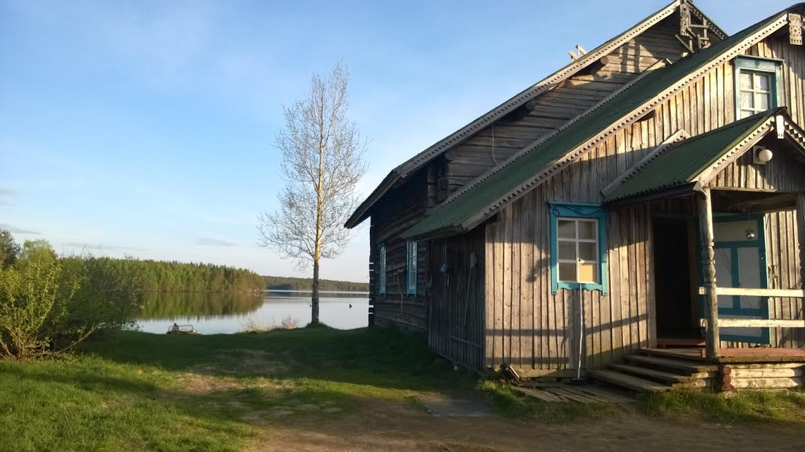 Vihtoora Lesosen talo. Rakennettu v. 1894